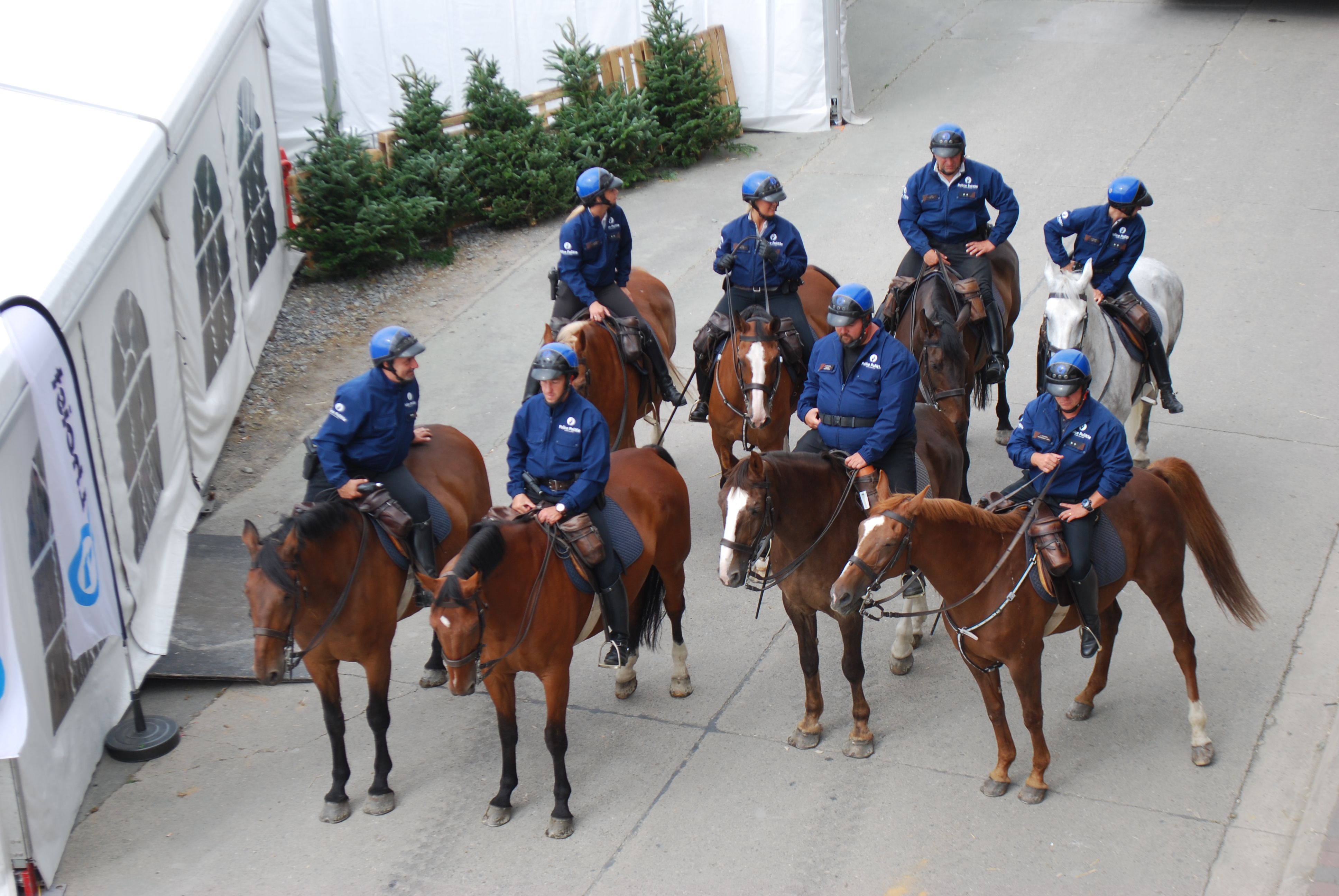 Vue de la 81e foire agricole de Libramont, en 2015.